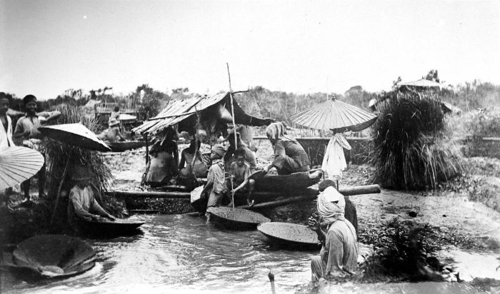 Repronegatief. Diamantwinning bij Tjempaka bij Martapoera, Zuidoost-Borneo